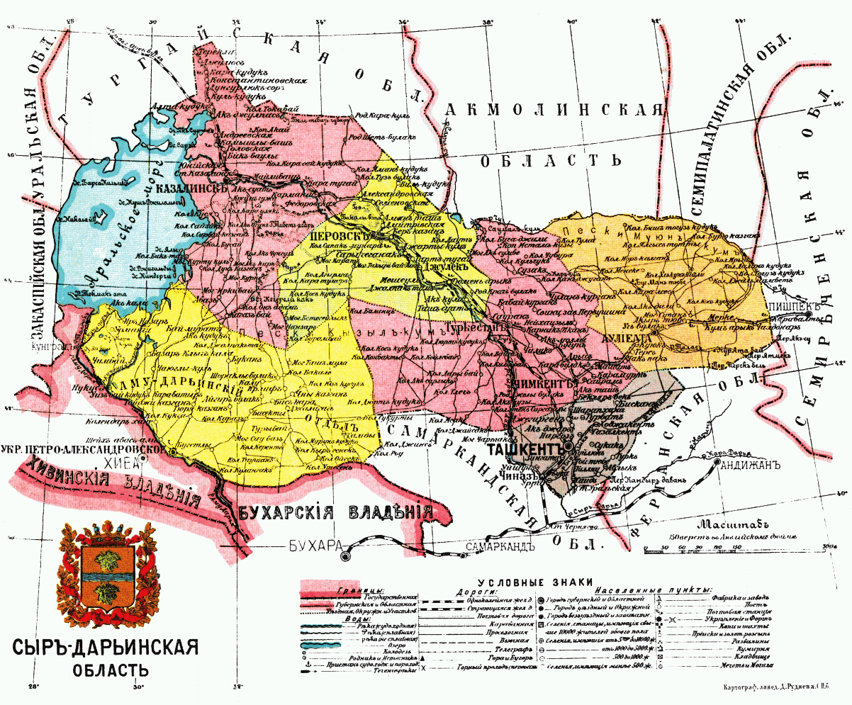 Карта Сыр-Дарьинской области, 1913